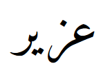 Узайр